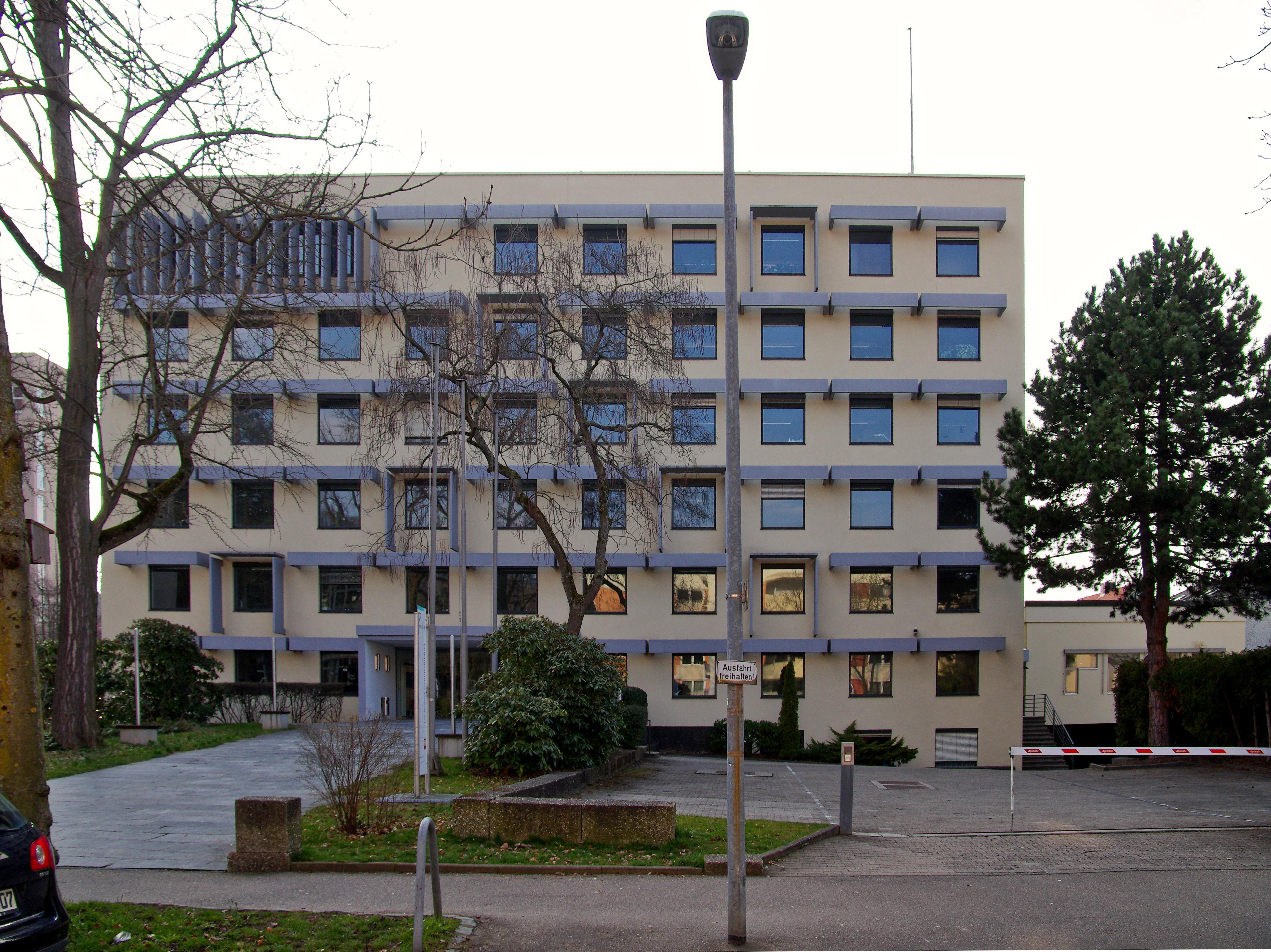 Maximilian Kolbe Werk im Caritas Haus